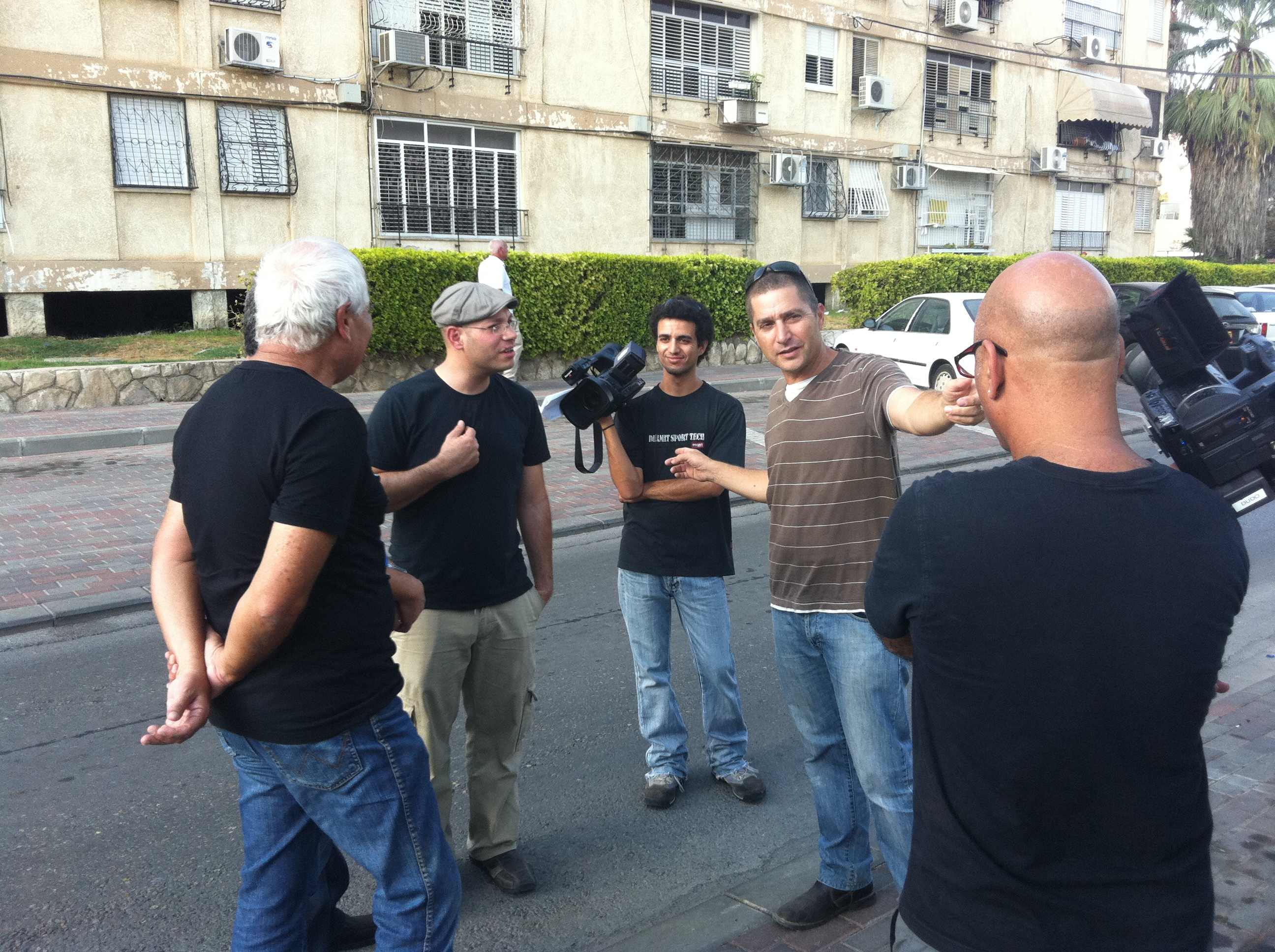 סדרת הטלוויזיה בשביל ישראל 2012-2013 ערוץ מאיר